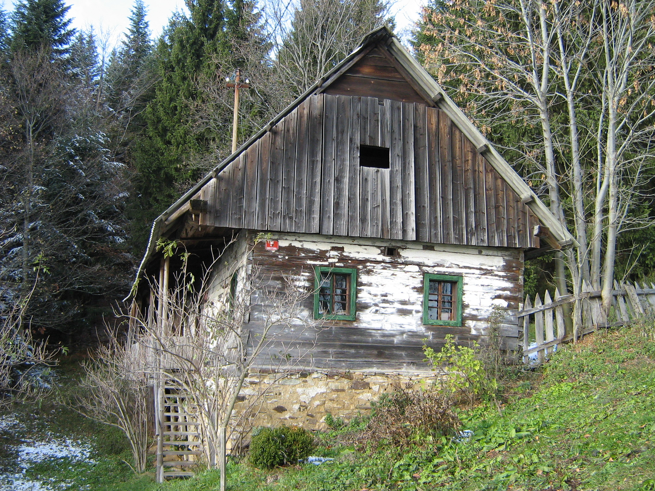 Ferdinadova domačija- črna kuhinja-muzej. Slika predstavlja staro,preprosto ter skromno Pohorsko kmečko hišo, ki jo sestavljajo črna kuhinja, ena soba- hiša ter shramba-hramec.